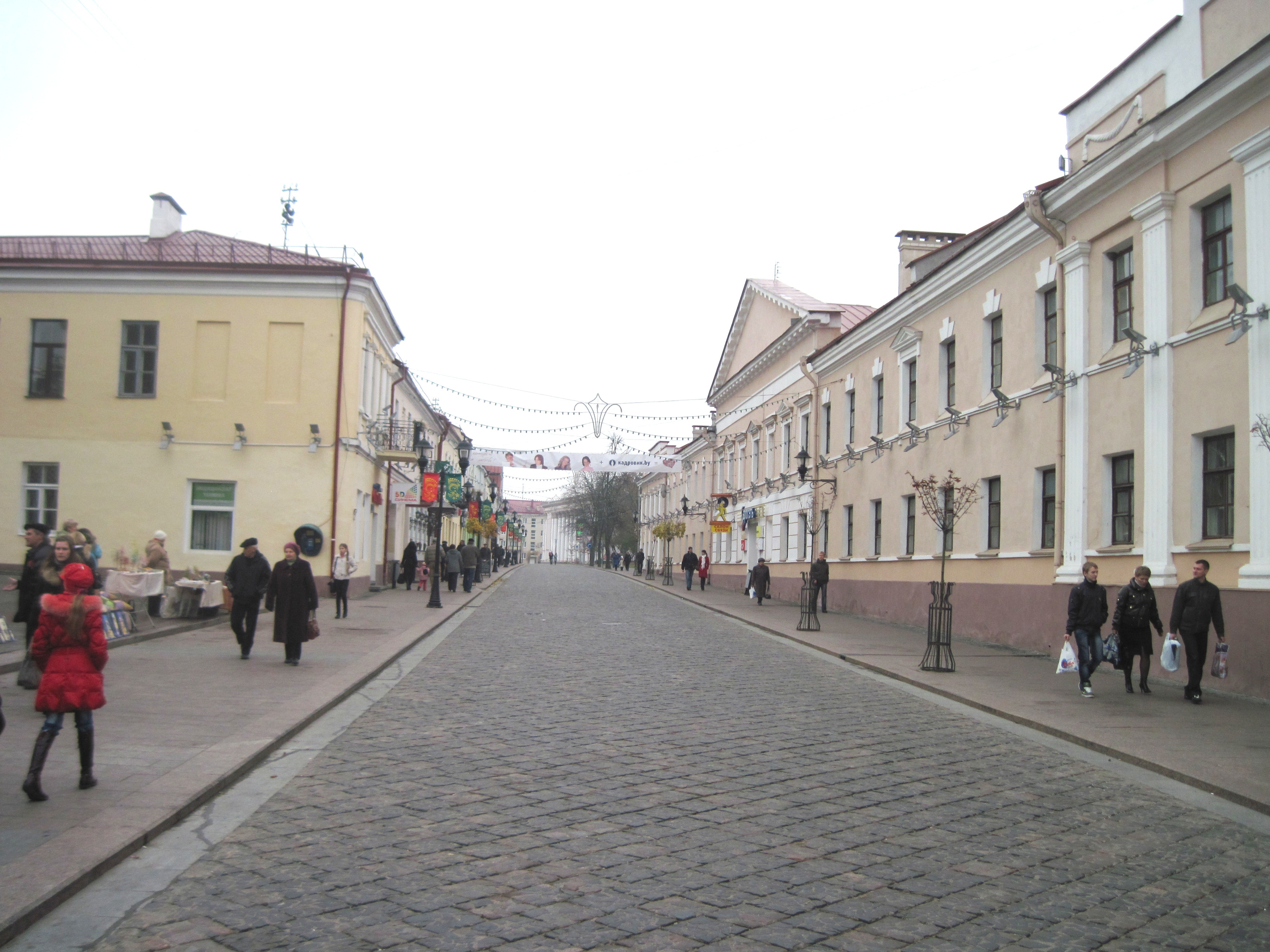 Беларуская (тарашкевіца): Вуліца Савецкая у Гродна. Справа былая мужчынская гімназмя